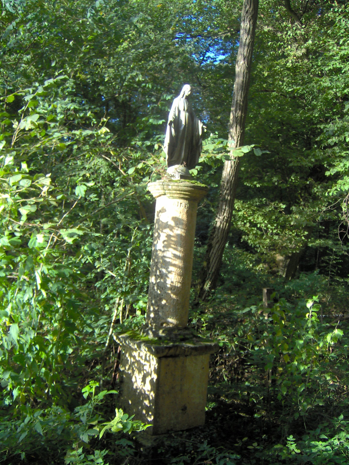 chene-a-la-vierge mailly-sur-seille